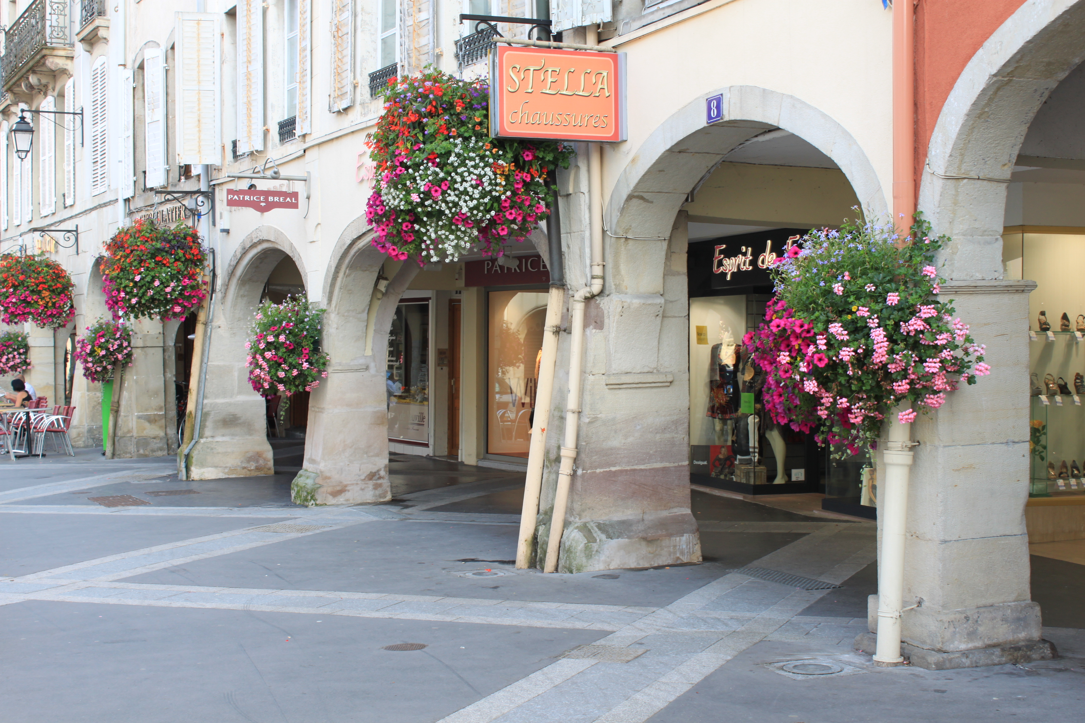 Arcades dans la rue Charles de Gaulle à Remiremont, Vosges, Lorraine, France